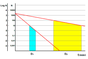 Grafico semi-logaritmico per la determinazione della termoresistenza di spore microbiche